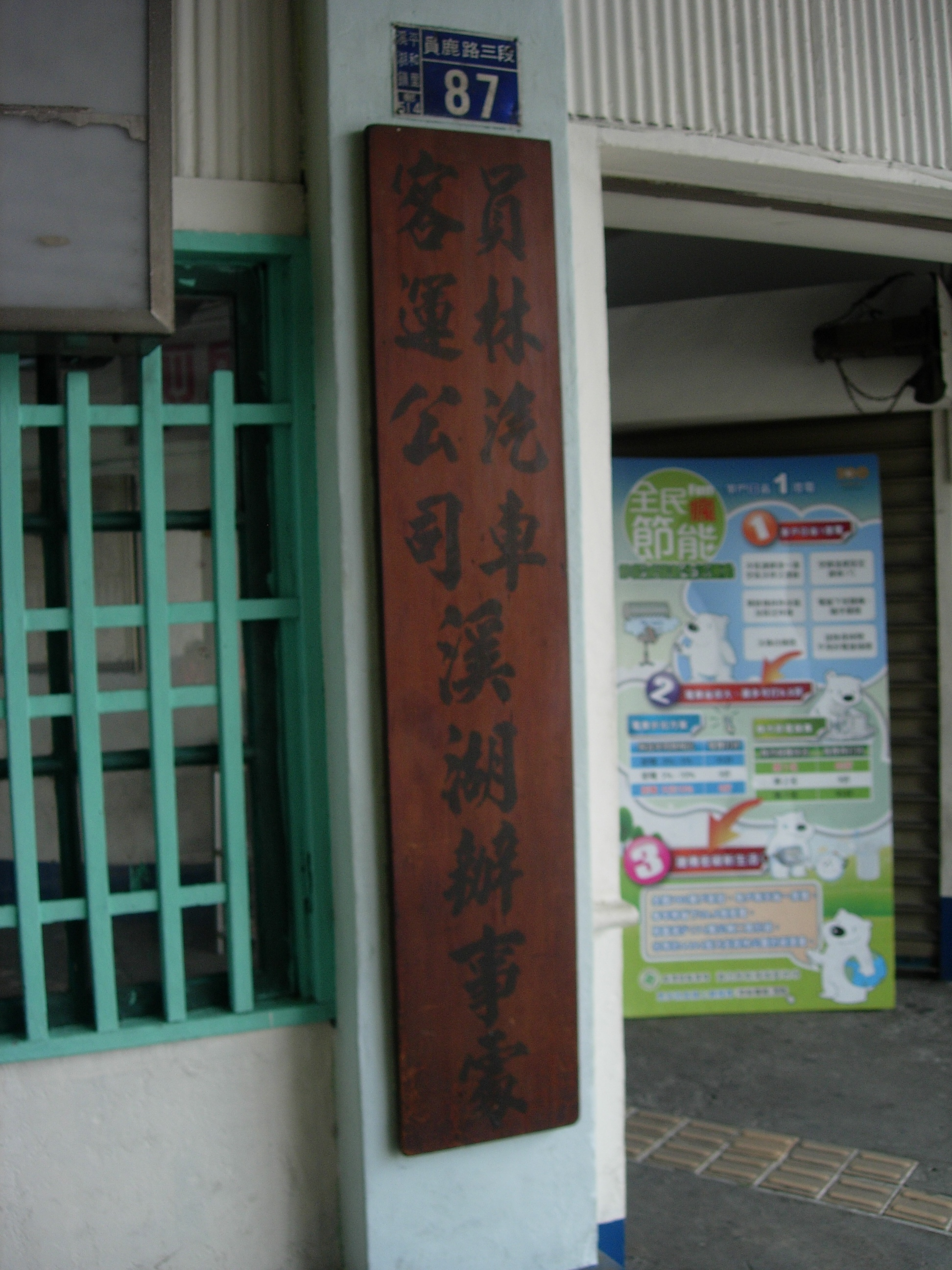 中文（台灣）: 員林客運溪湖站門牌。